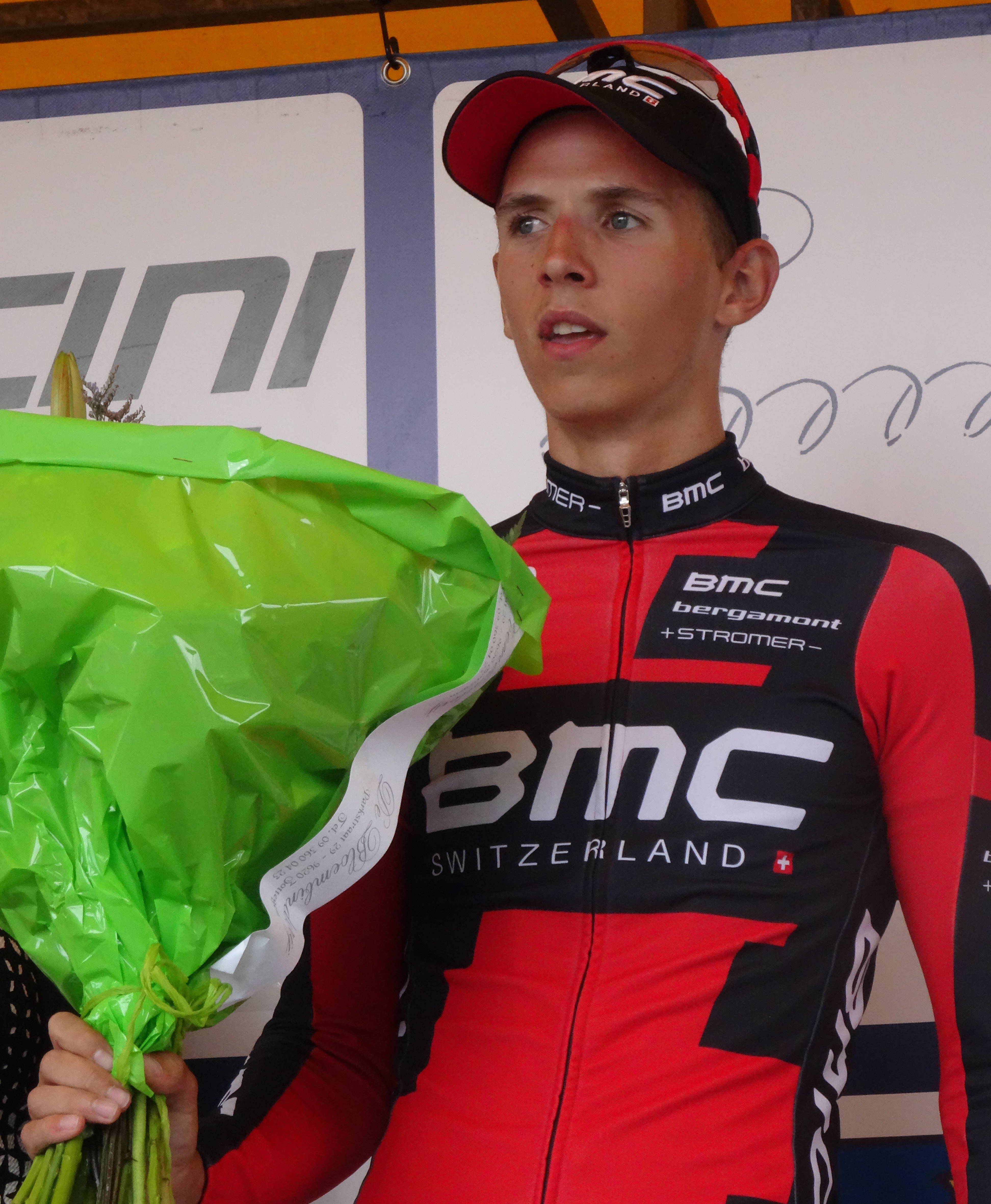 Reportage photographique réalisé le samedi 5 juillet à l'occasion du départ et de l'arrivée du Circuit Het Nieuwsblad espoirs 2014 à Grotenberge (Zottegem), Belgique.